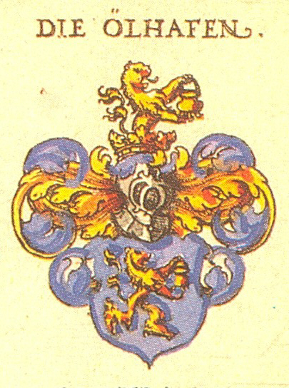 Wappen der Nürnberger ehrbaren Familie und seit 1729 Patrizierfamilie Oelhafen von Schöllenbach